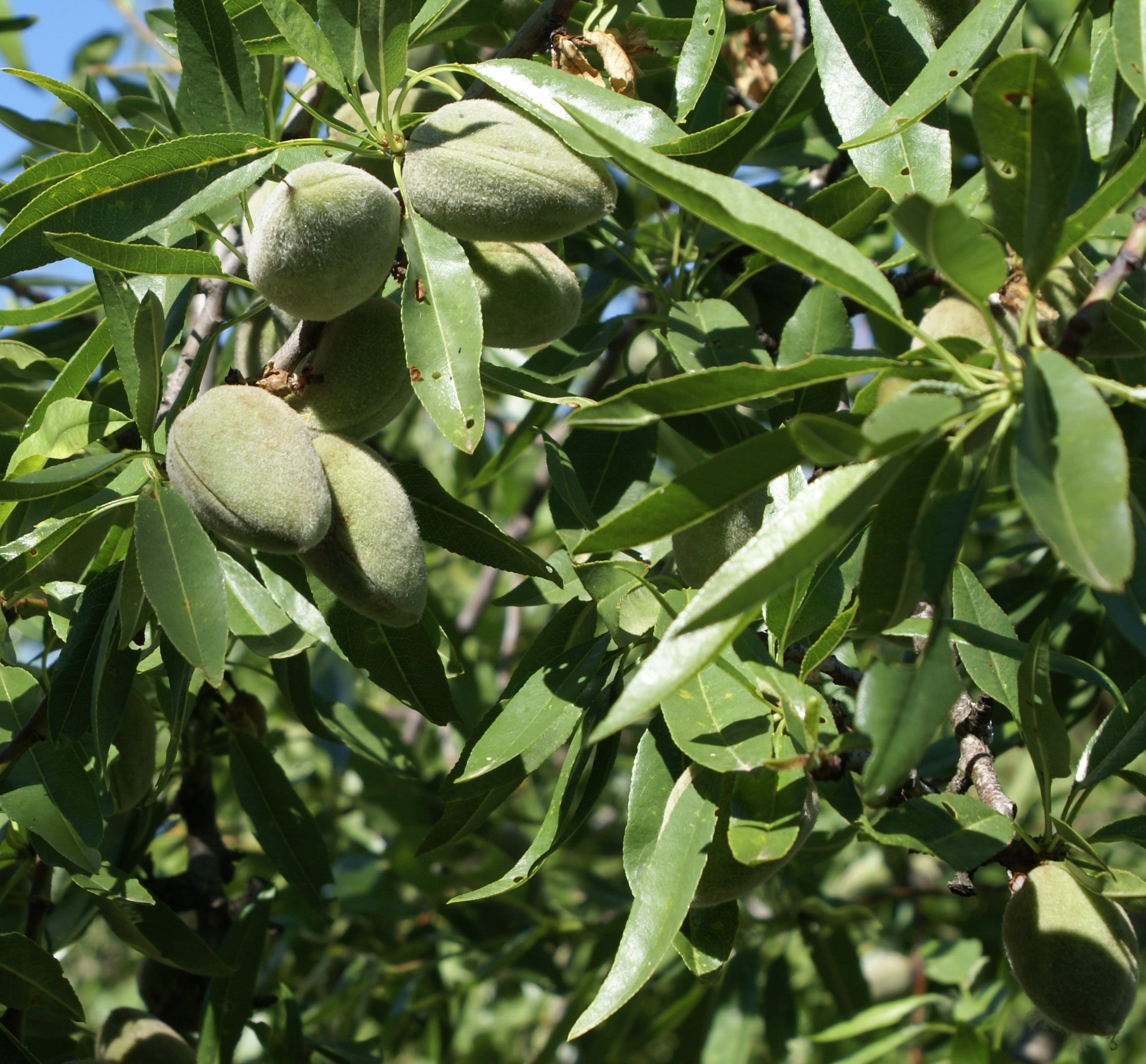 Almendras en el arbol , Alcalá la Real , Jaen , España